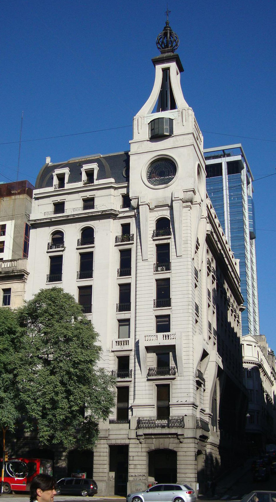 Vista desde la esquina de Av. Leandro Alem y calle Juan D. Perón del edificio construido en 1912 para la Compañía Naviera de Nicolás Mihanovich. Actuales oficinas del Correo Argentino. Tte. Gral. Juan D. Perón 300. Buenos Aires, Argentina.